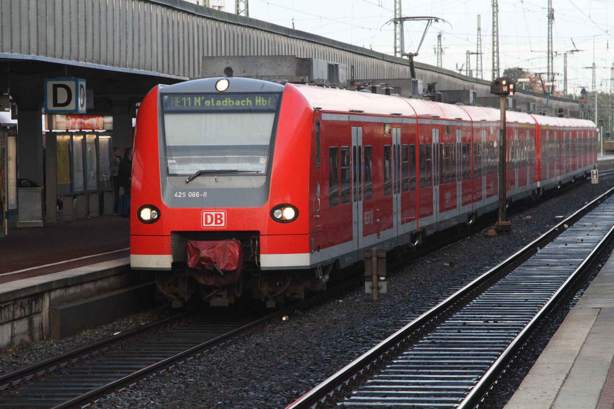 Regionalexpress 11 im Hauptbahnhof Dortmund